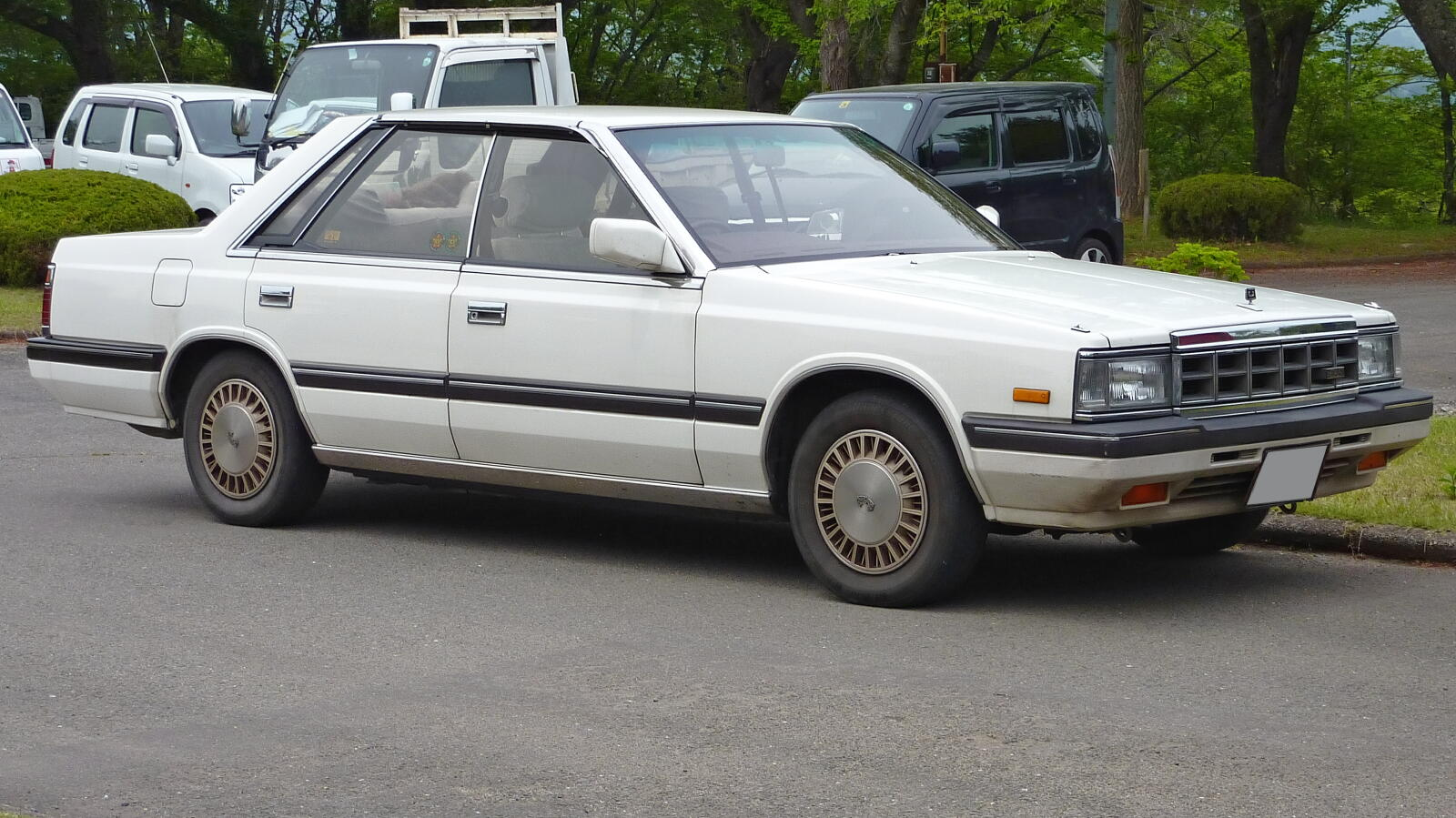 日産・ローレル（C32型ハードトップ・前期型）